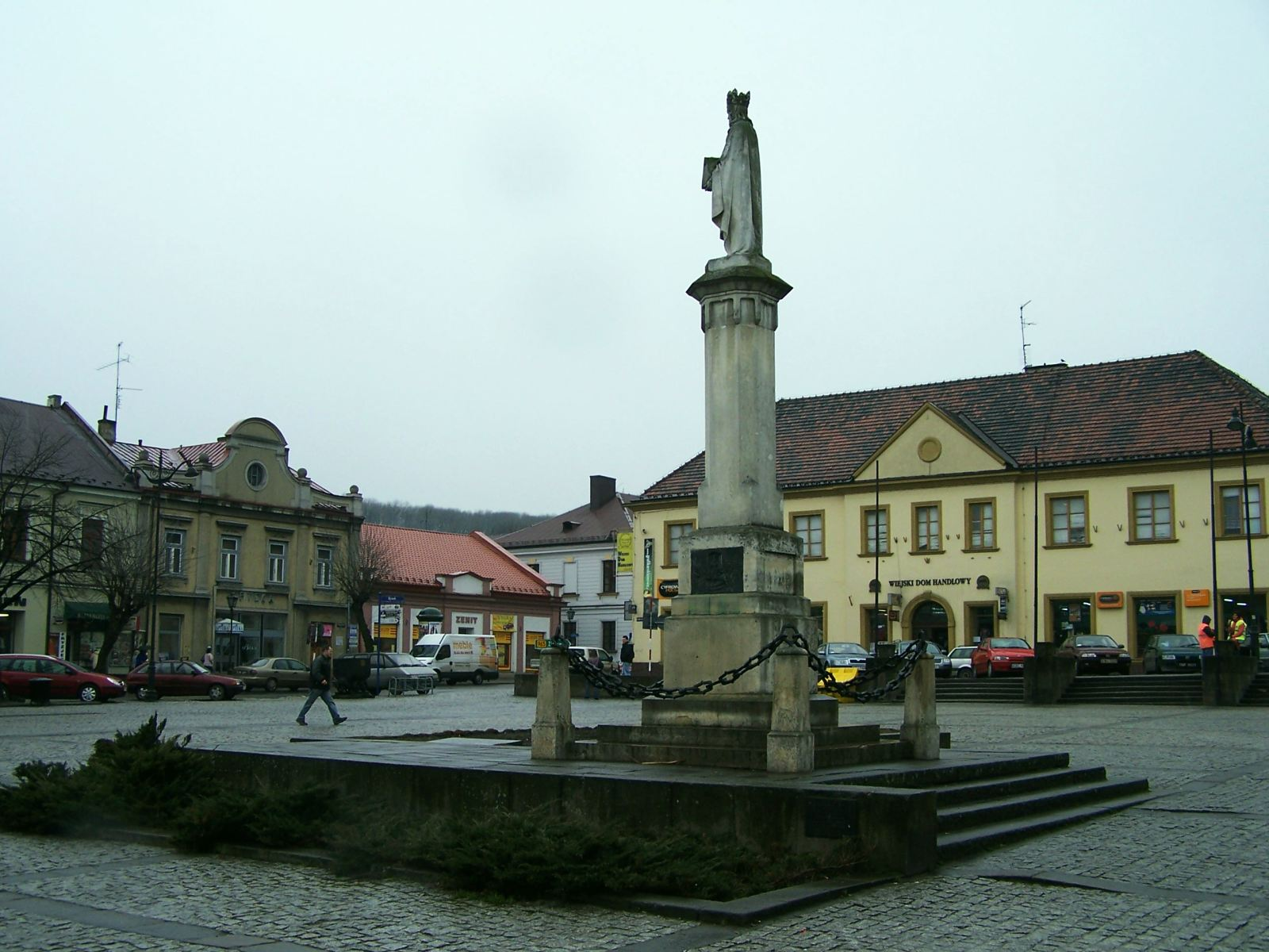 Bochnia, Rynek